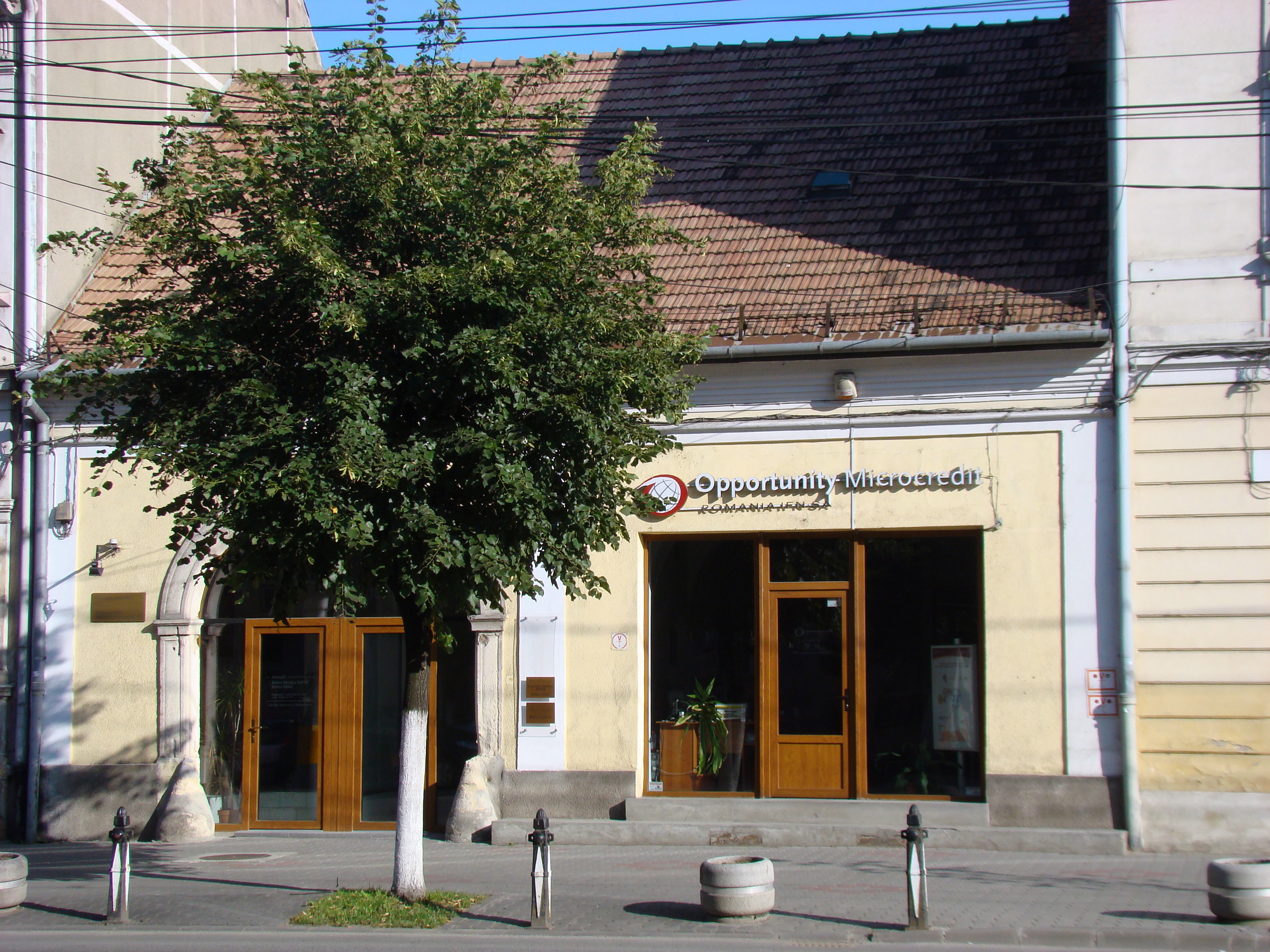 Casă, monument istoric, Bd.21 Decembrie 1989, nr.48